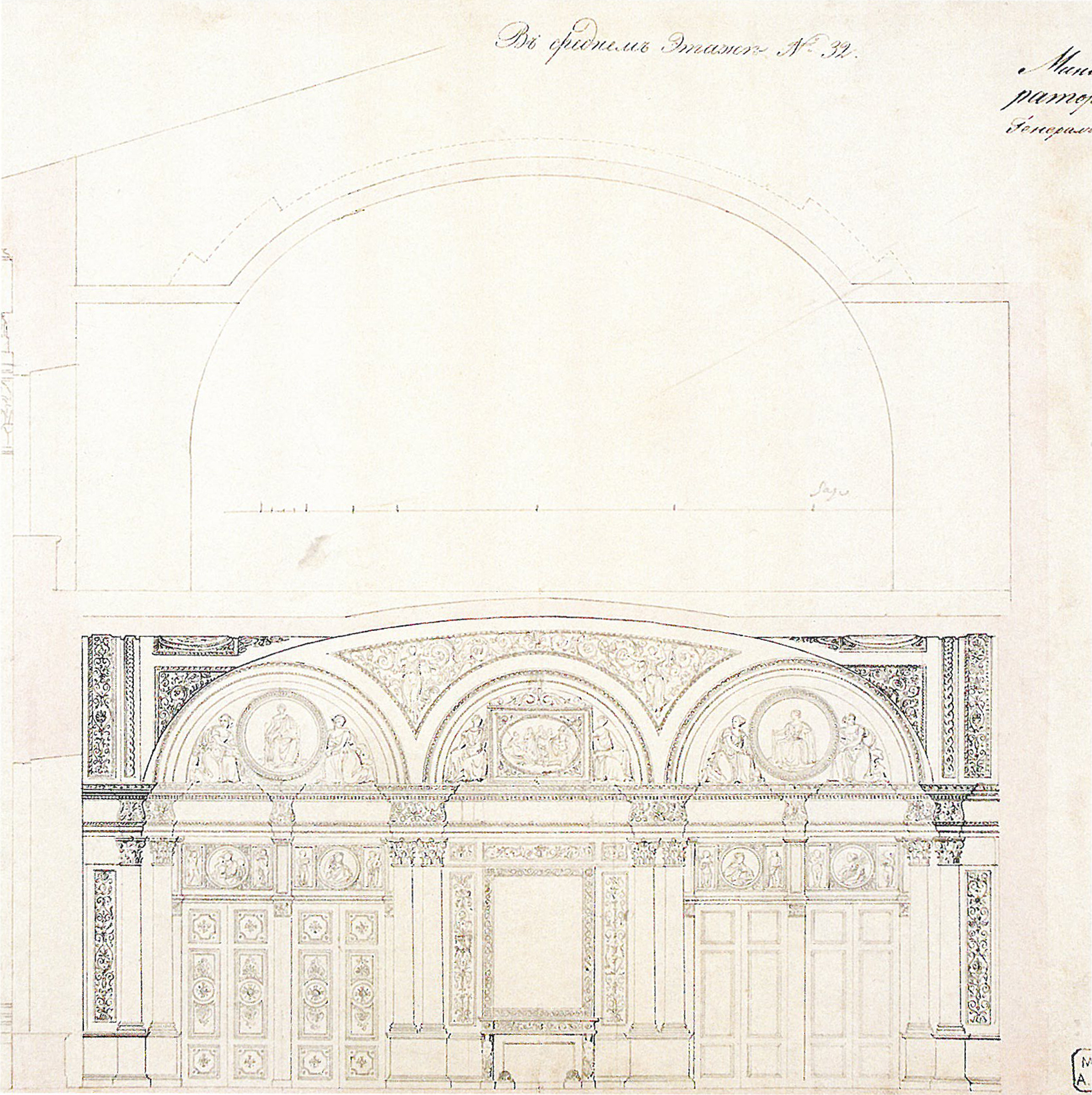 Проект отделки Золотой гостиной на половине наследника цесаревича Александра Николаевича. Первоначальный вариант. НИМ РАХ